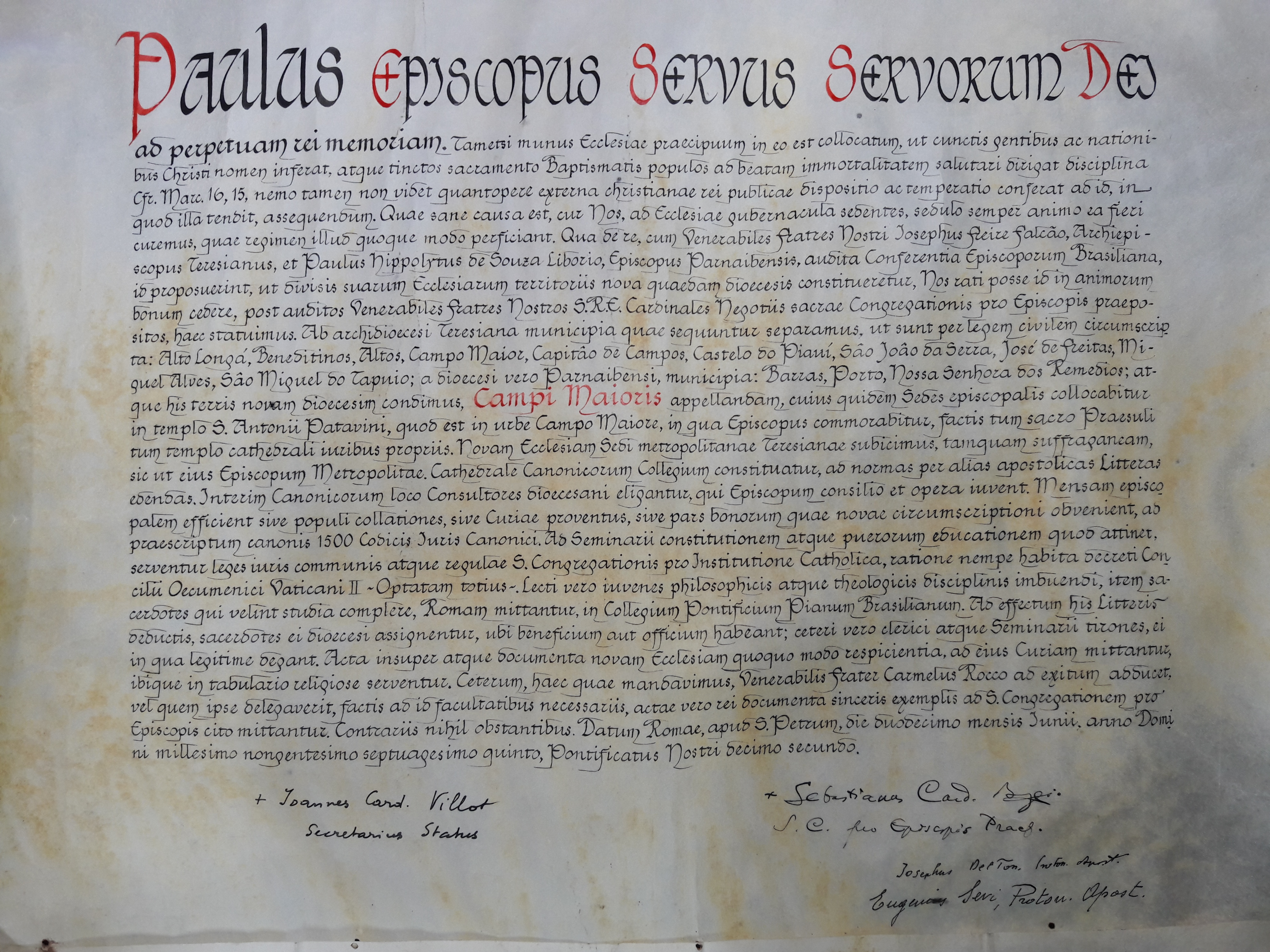 A Bula de criação da Diocese de Campo Maior foi criada em 1975, com autorização do Papa Paulo VI.